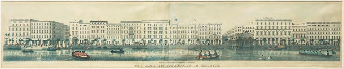 „Der alte Jungfernstieg in Hamburg“, kolorierter Stahlstich, 14 x 81 cm, l. u. bez. 'Aufgenom. u. grav. v. O. Moritz'